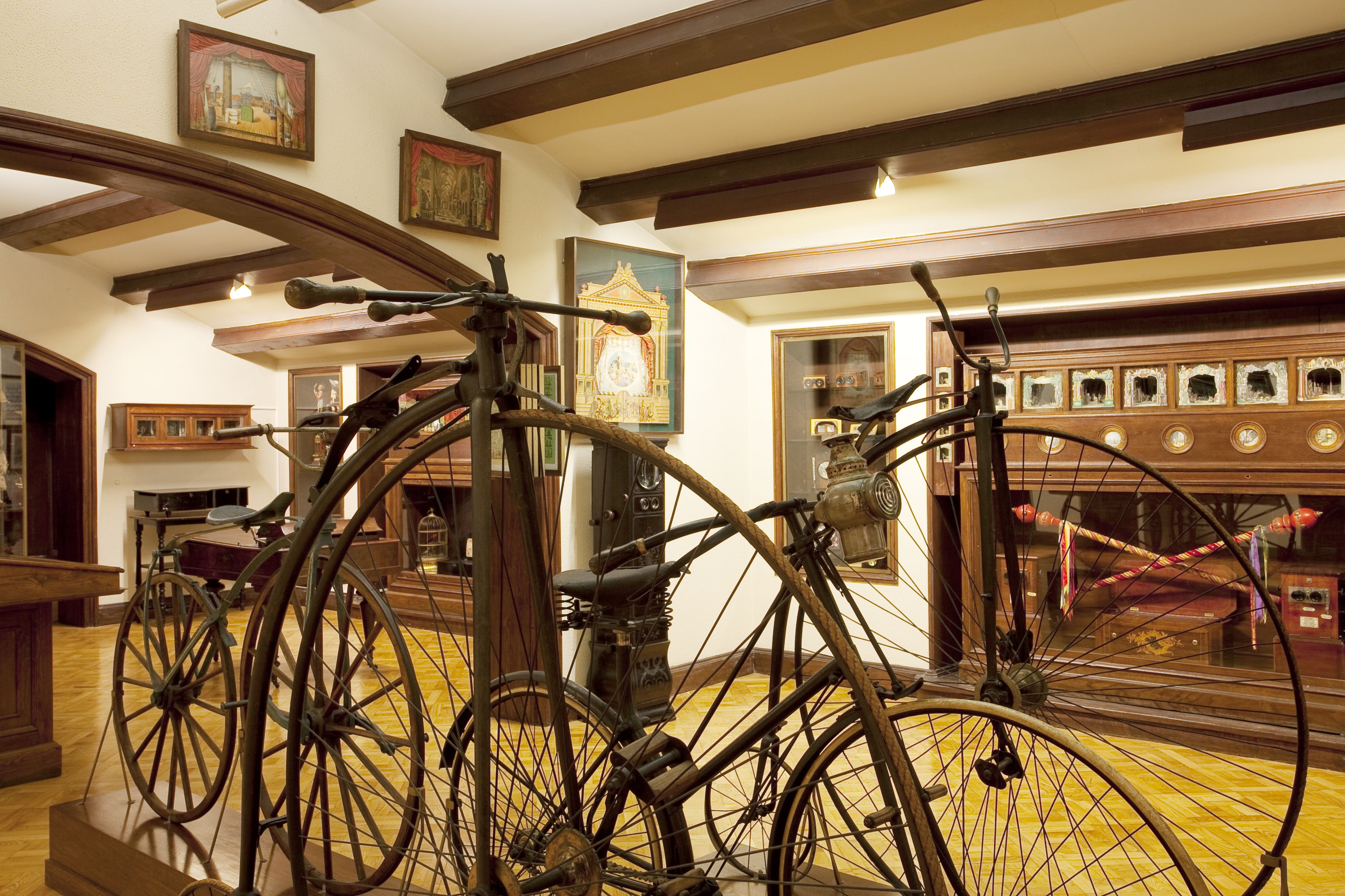 Diversions Gabinet col·leccionsta - Fot. GUILLEM F-H.jpg